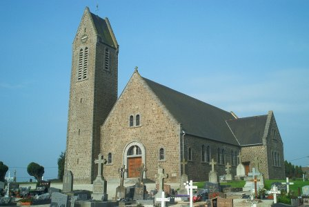 Eglise Saint-Etienne de Millières